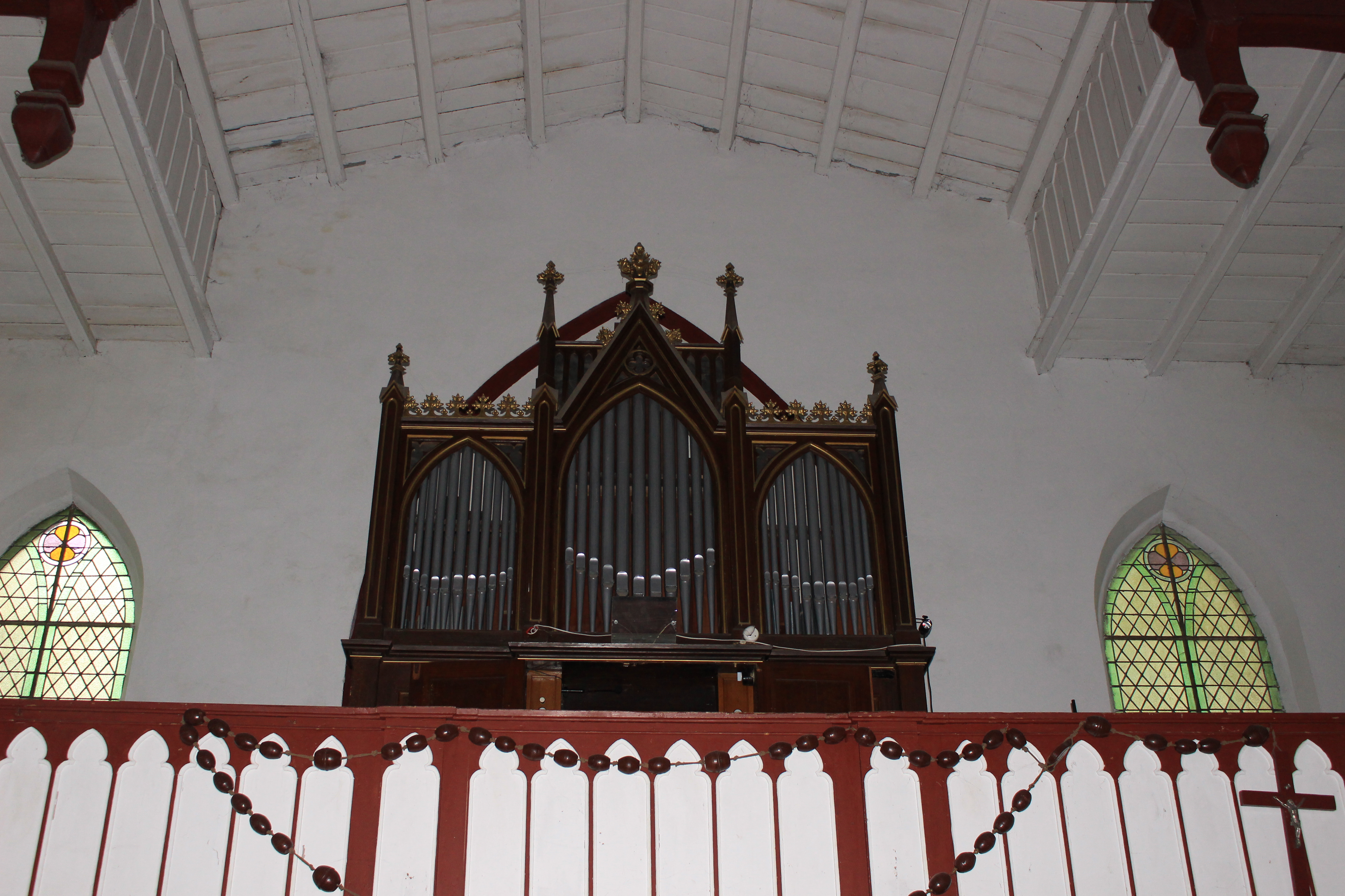 Chór Cecenowo